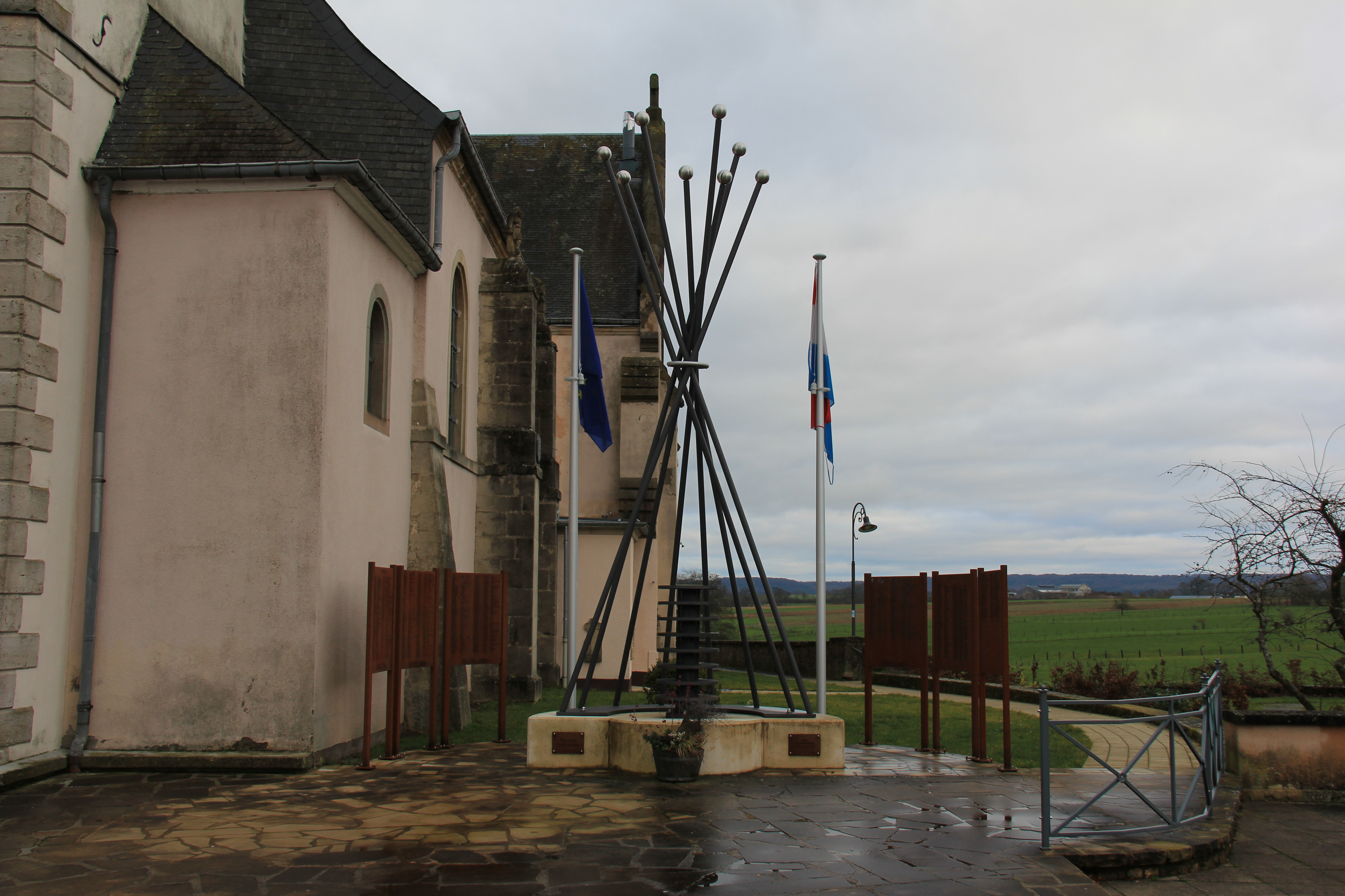 De Monument des enrôlés de force nieft der Biekerecher Parkierch, deen 2011 ageweiht gouf.